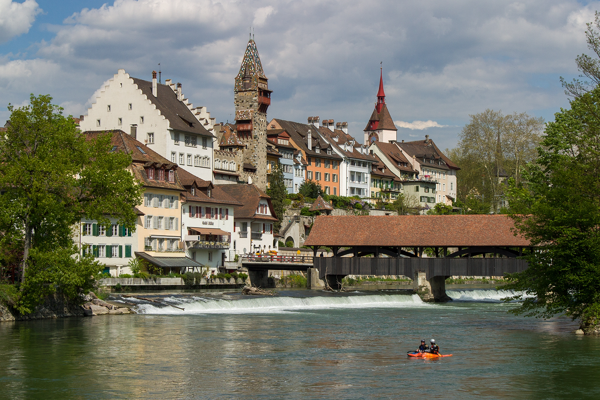 Bremgarten (AG)